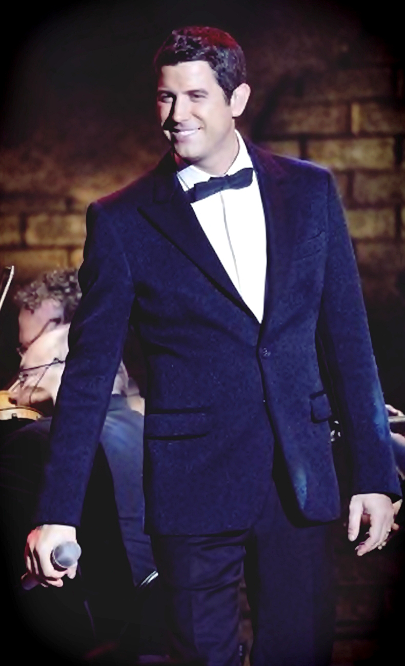 Sébastien de IL DIVO en concierto. 2014